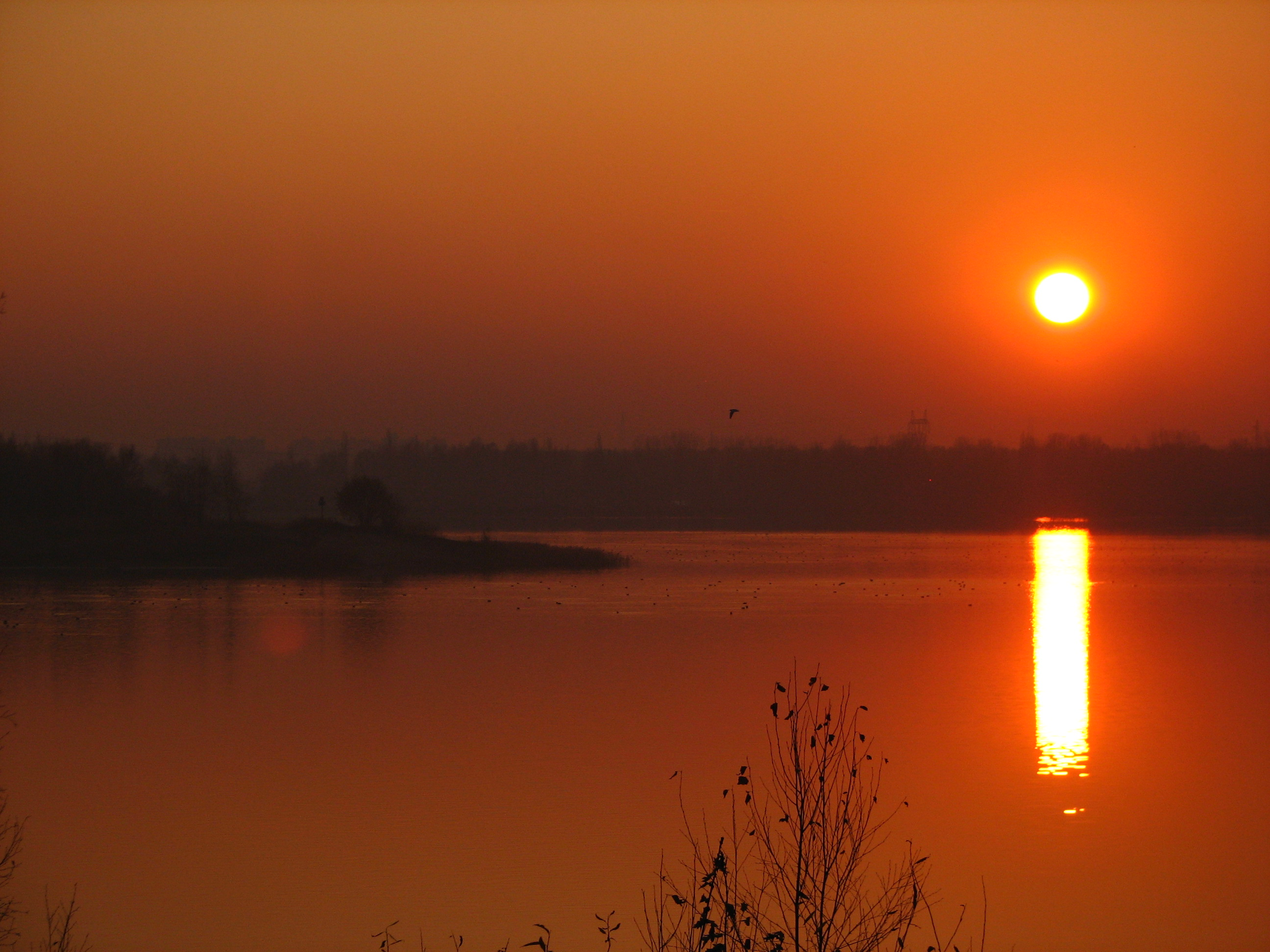 PogoriaII